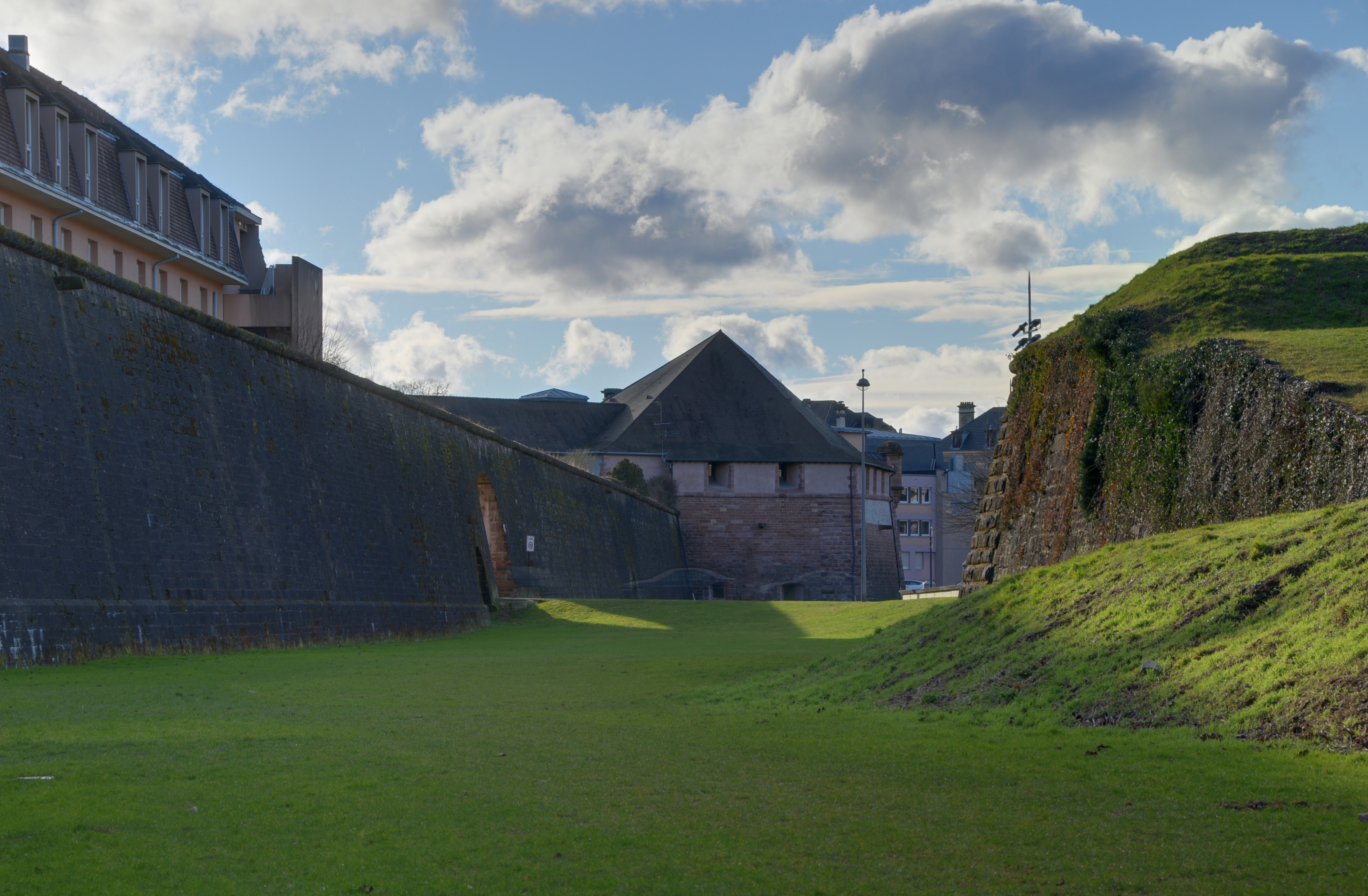 Entrée nord de la vieille ville de Belfort (HDR).